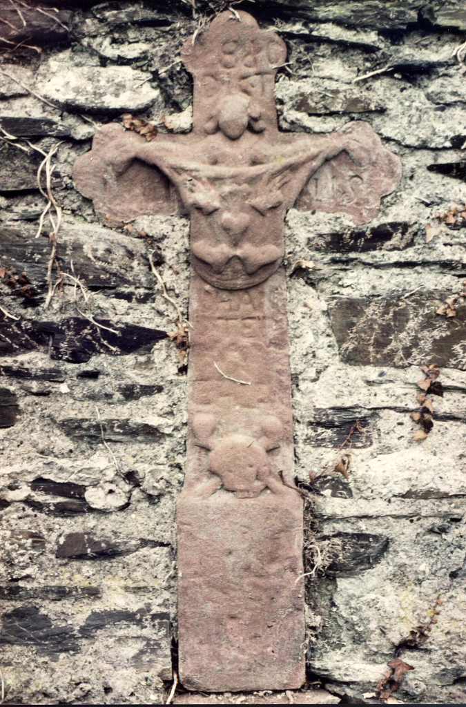 Stark verwittertes Grabkreuz in Lösnich. Wahrscheinlich von J. Stephan Ehlen, verstorben 1810.